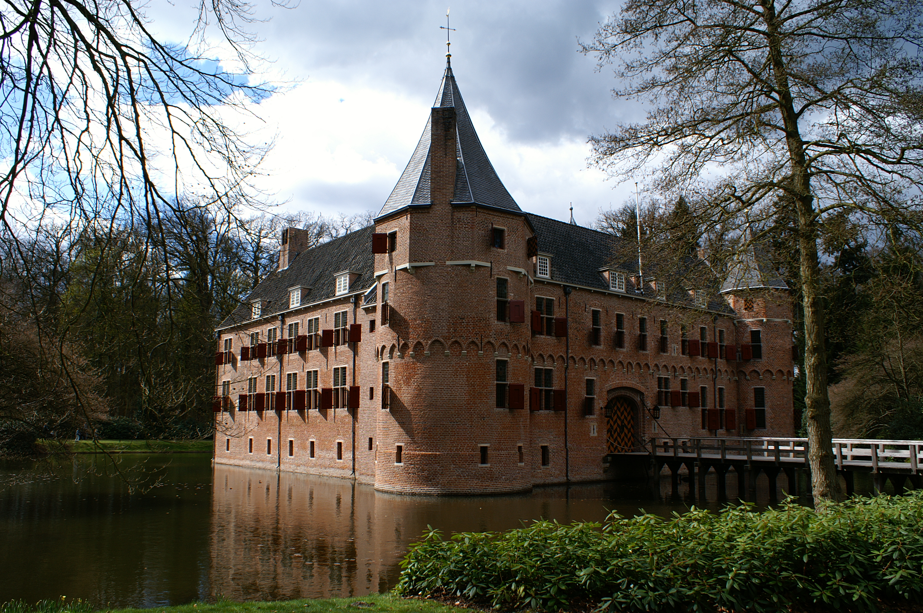 Kasteel 't Oude Loo te Apeldoorn.